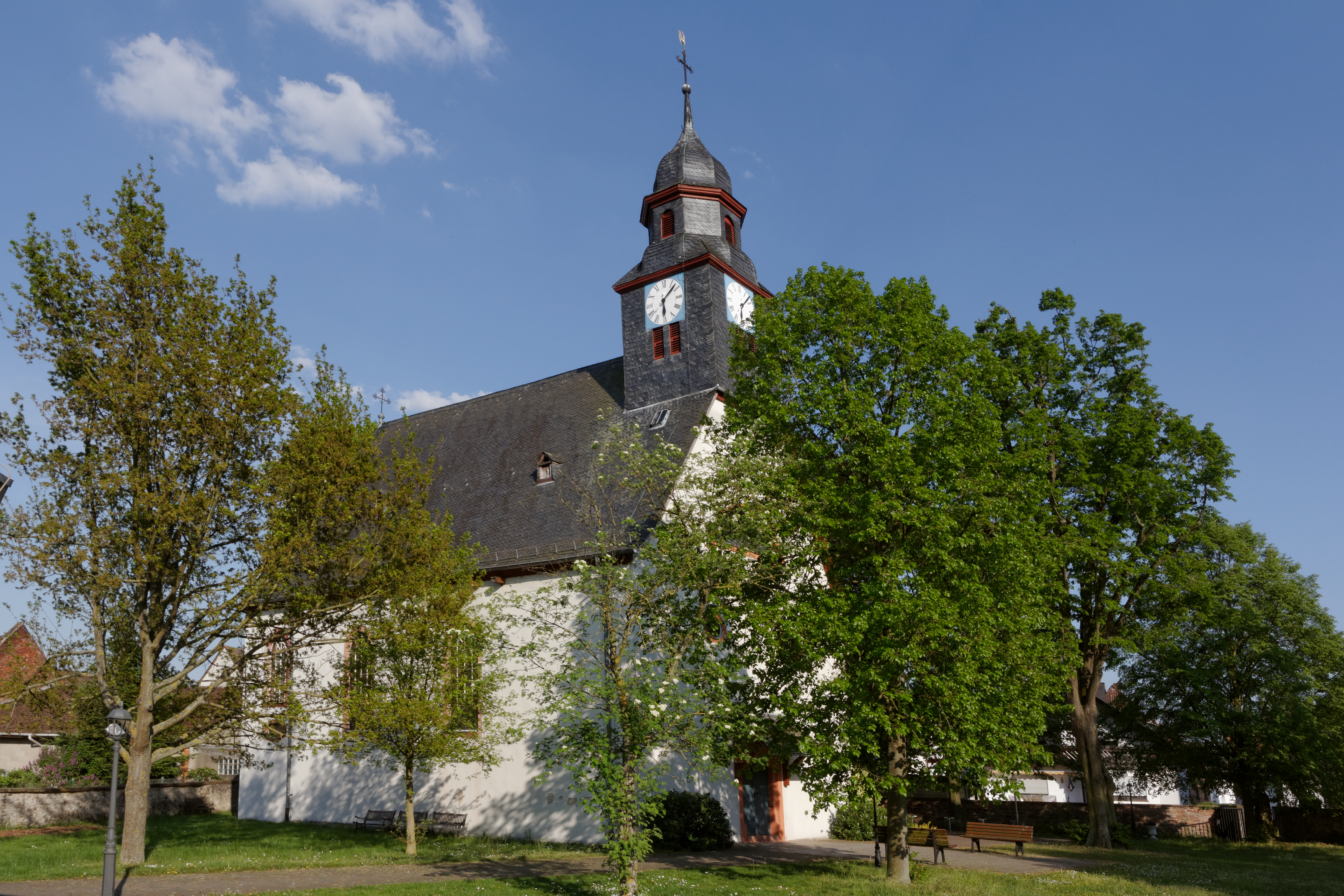 Evangelische Kirche in Hergershausen, einem Stadtteil von Babenhausen (Hessen). Der Saalbau im Barockstil mit Giebeldachreiter wurde 1711/12 erbaut.